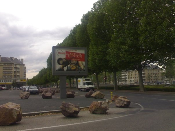 Affiche exposition Sir Arthur Benton (2008)